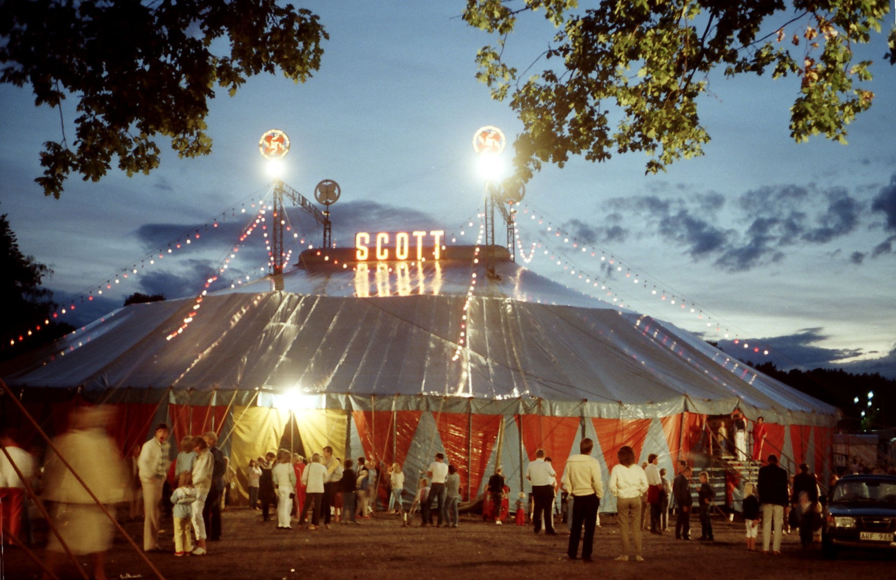 Storängsbotten, Norra Djurgården, Stockholm, Circus Scott